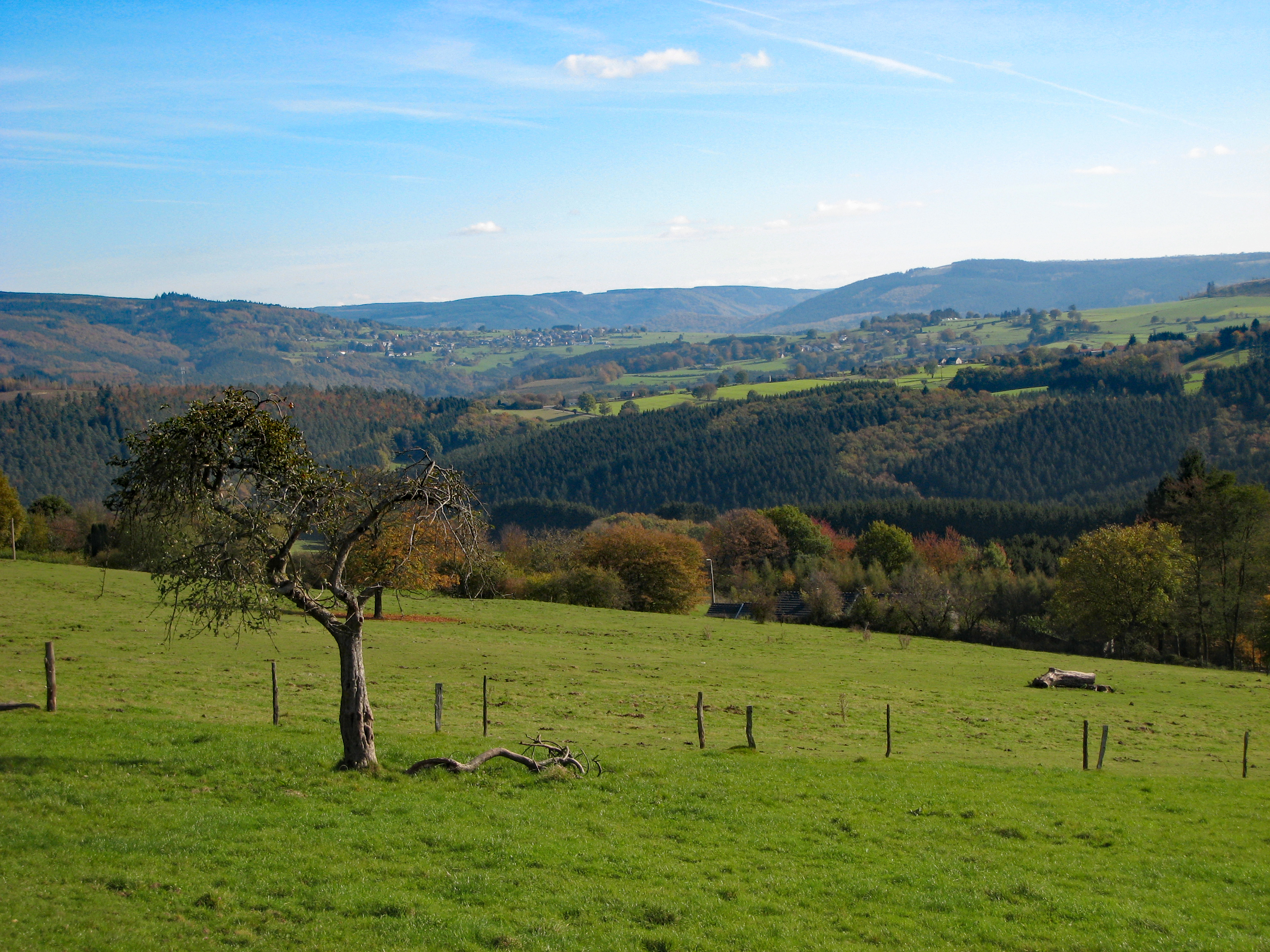 Paysage ardennais près de Lorcé avec vue sur le village de Stoumont au loin.